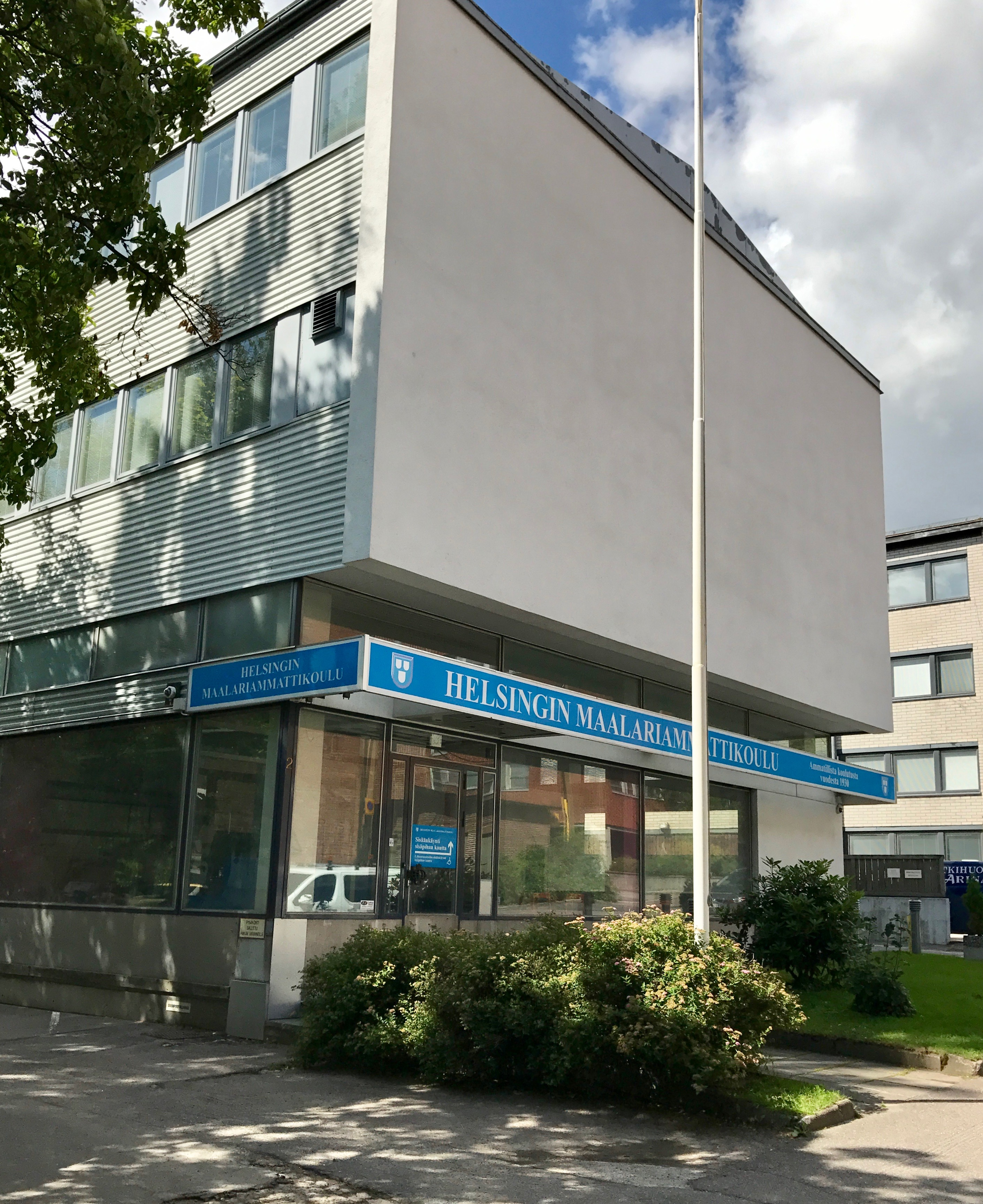 Helsingin maalariammattikoulu